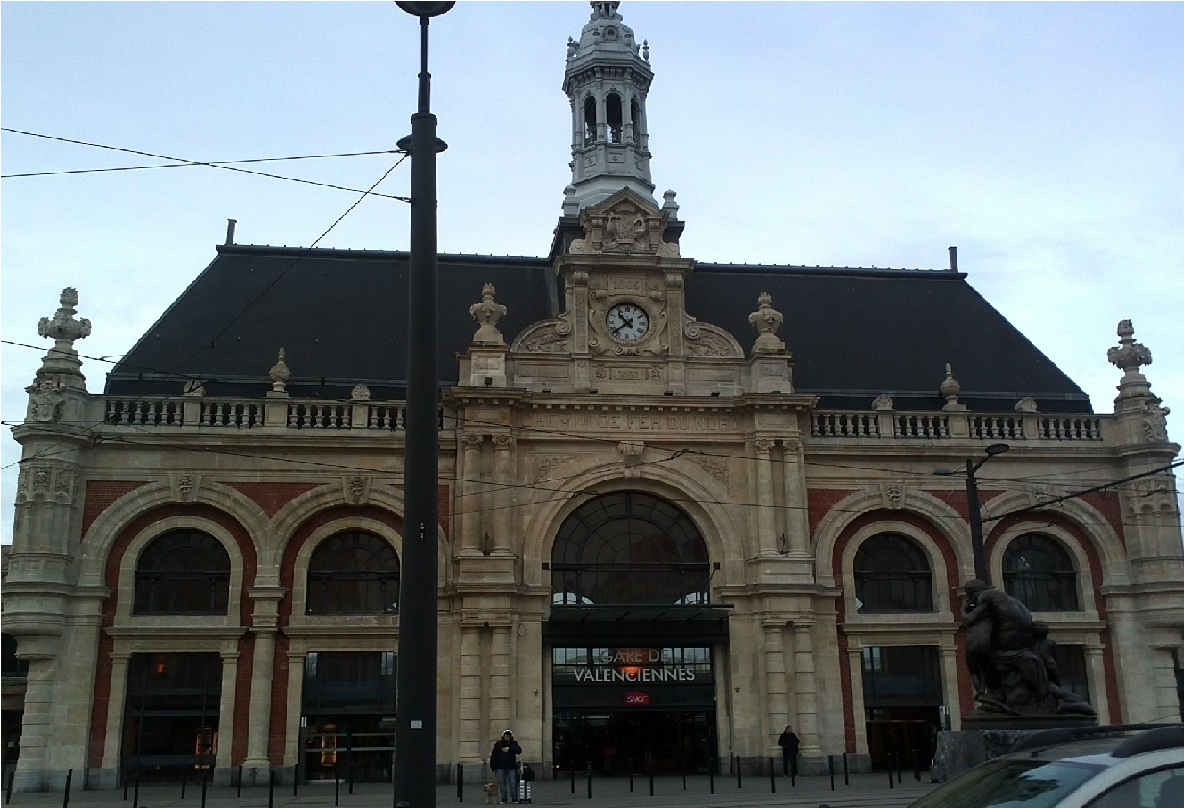 Gare de Valencienne-2013